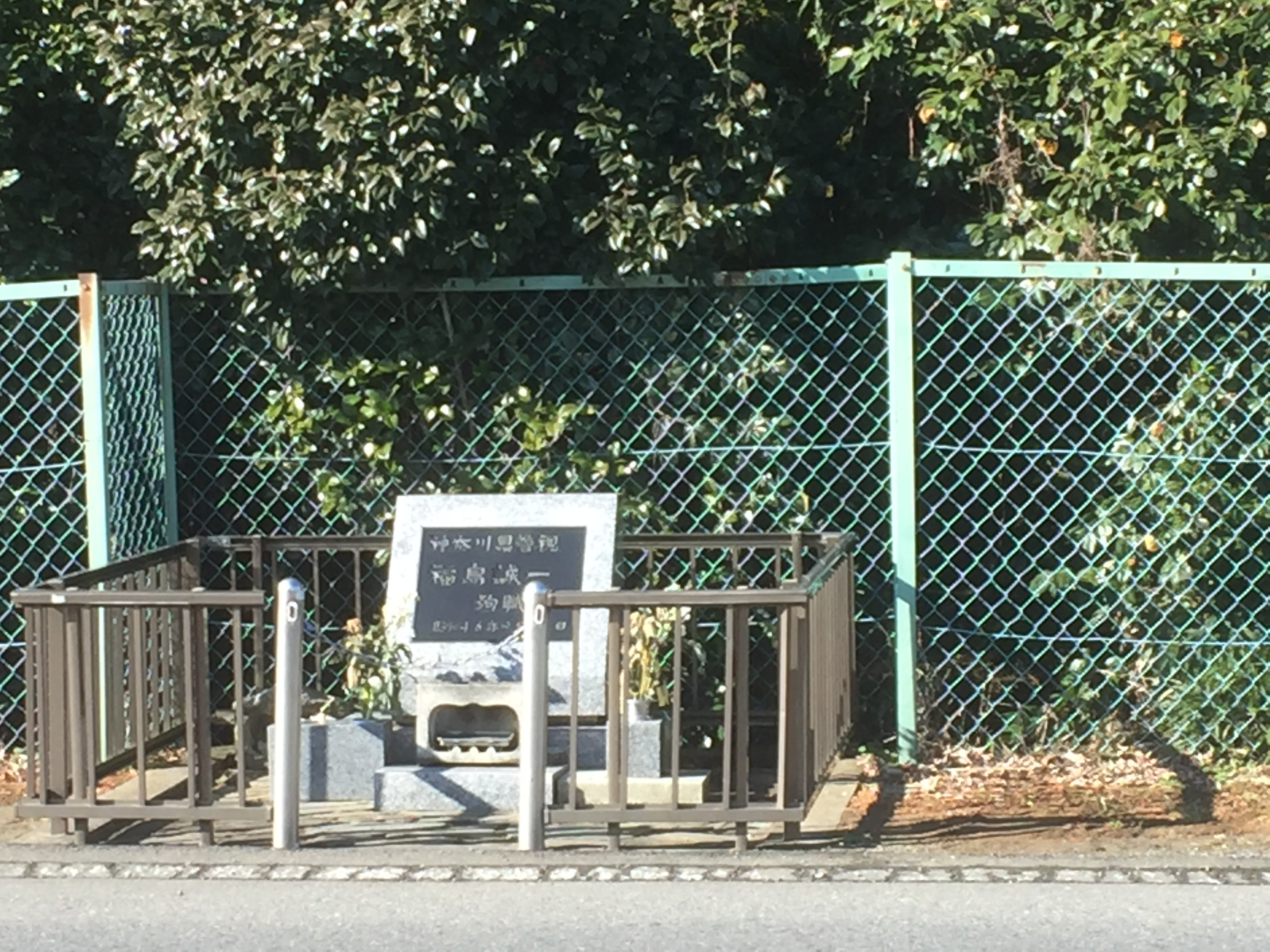 東峰十字路事件殉職者の慰霊碑